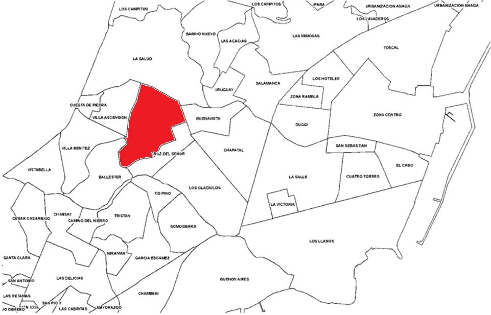 Localización del barrio